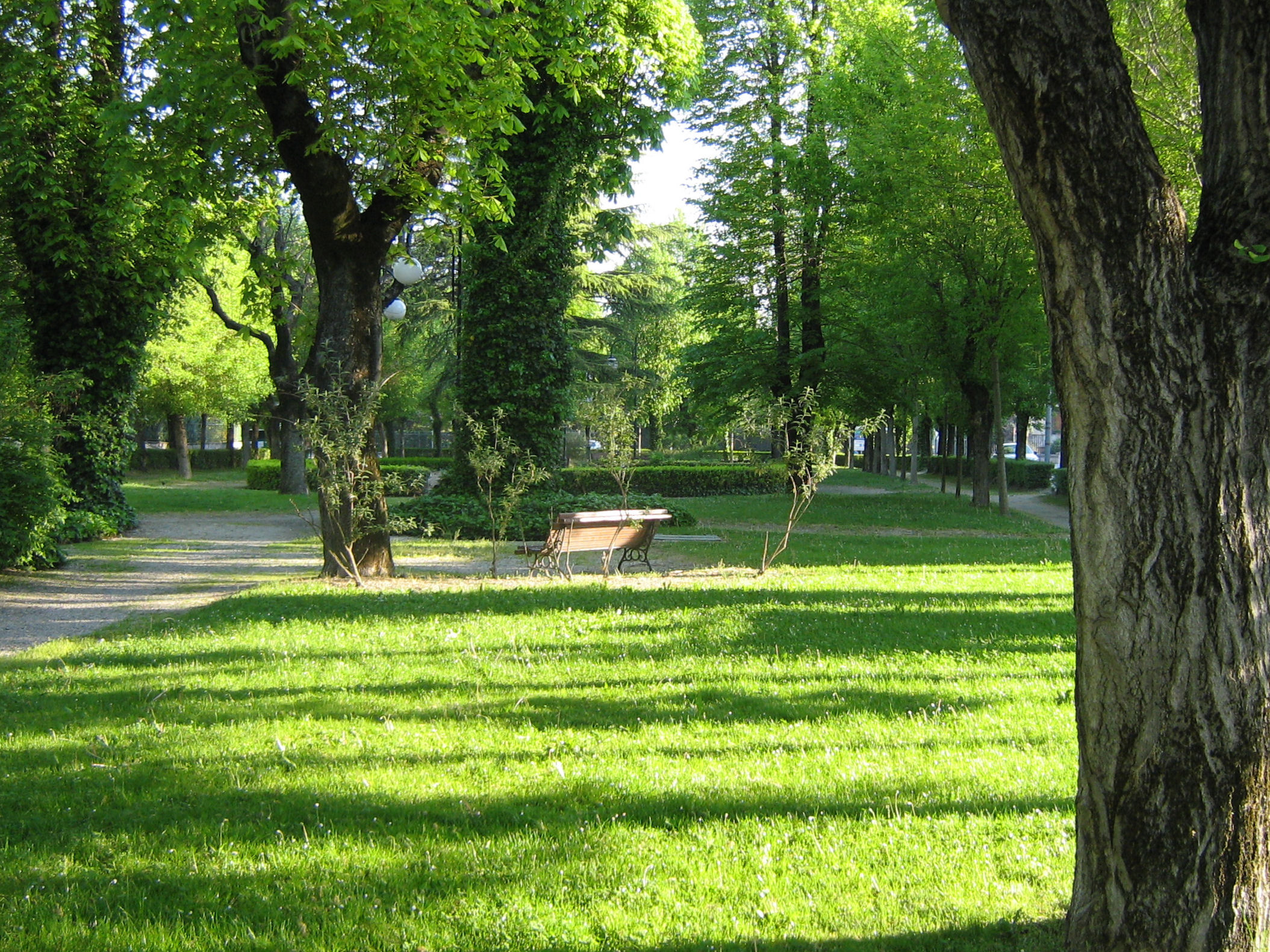 Castel Goffredo, giardini pubblici